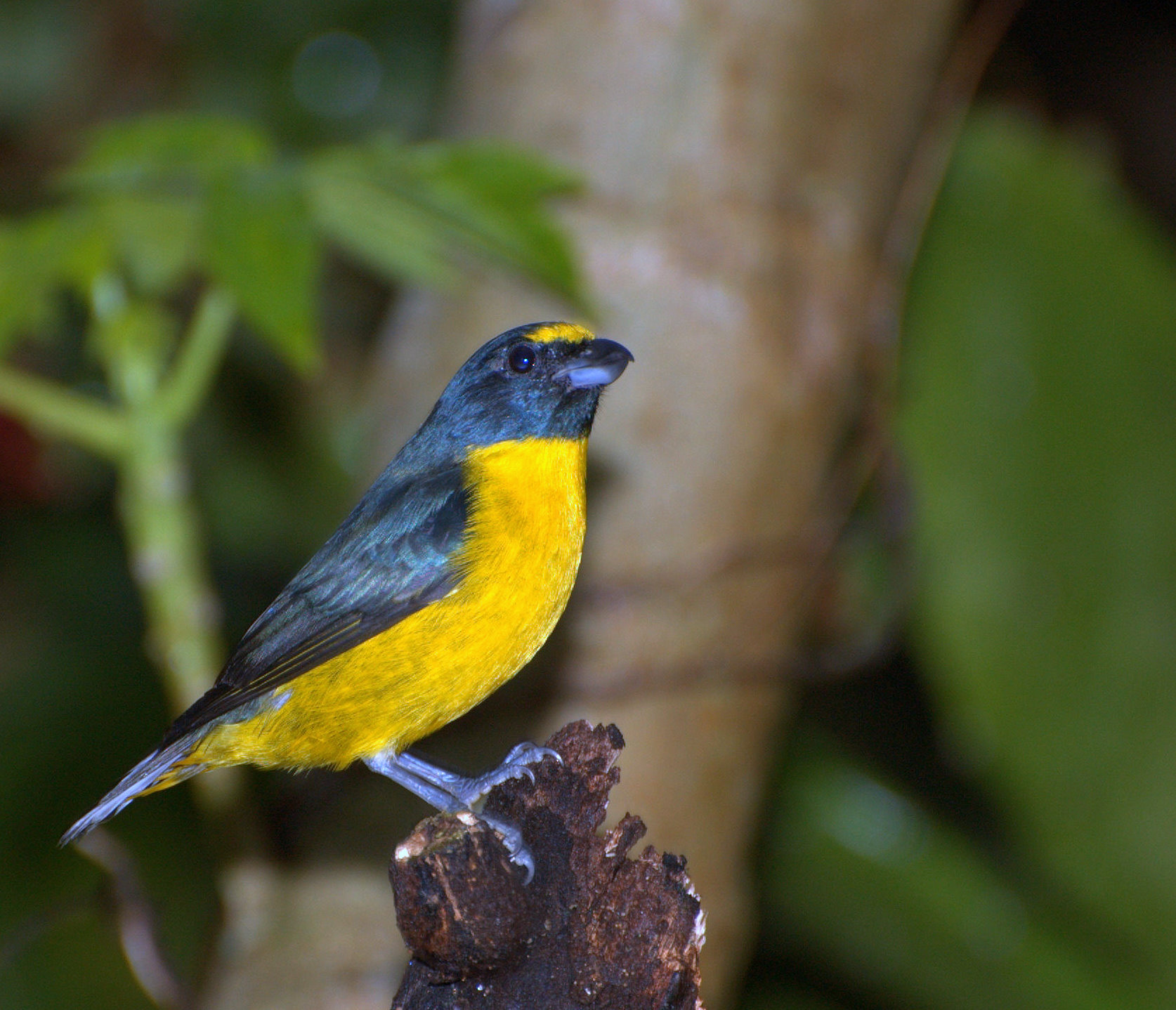 Vale do Ribeira - Registro-SP - Brasil